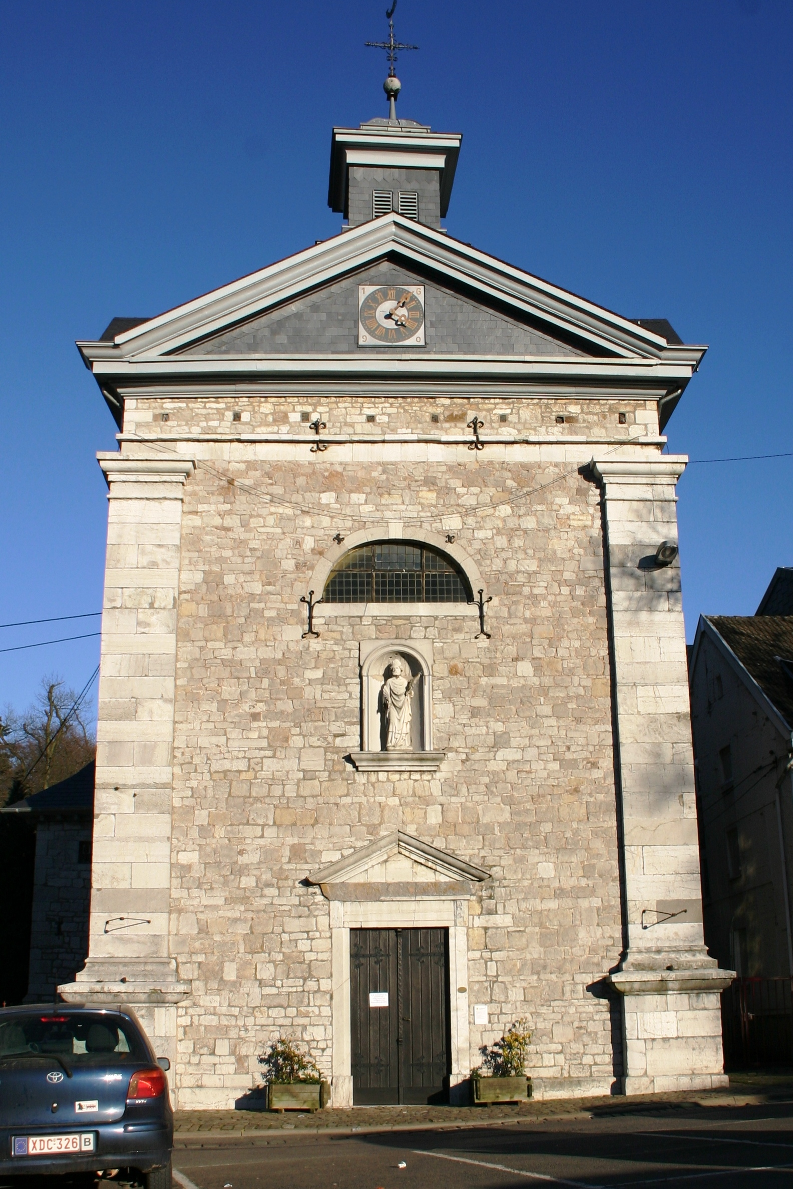 D'Lambertkapell zu Eupen.